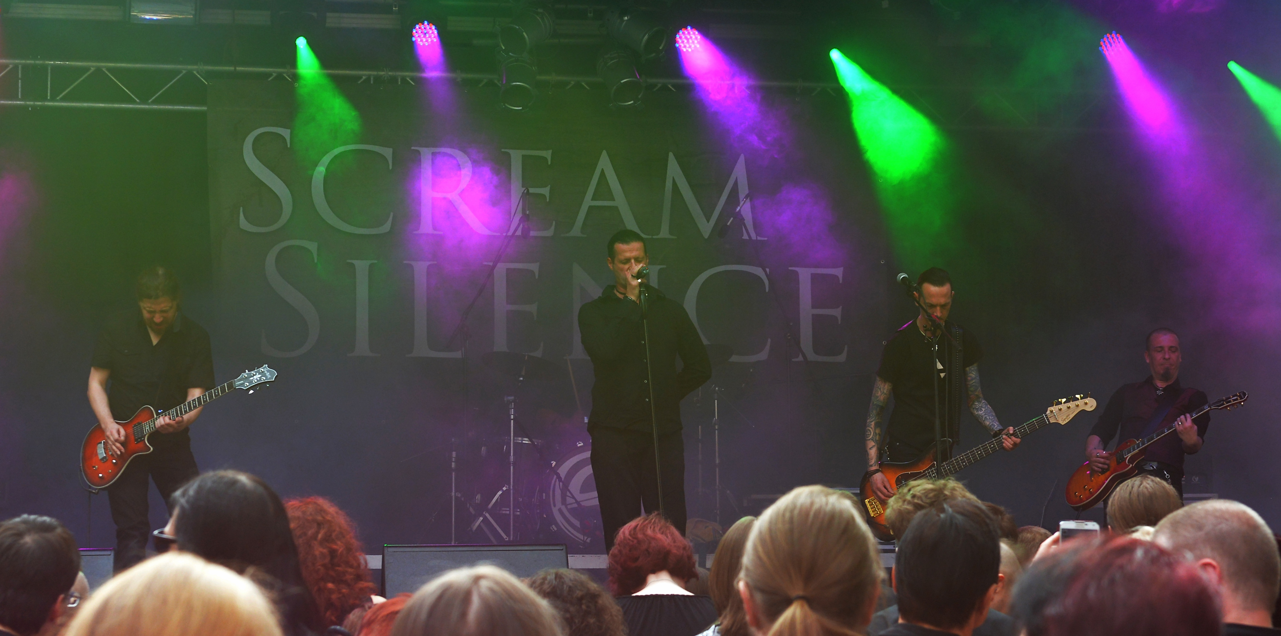 Scream Silence beim Castle Rock 2014 auf Schloss Broich